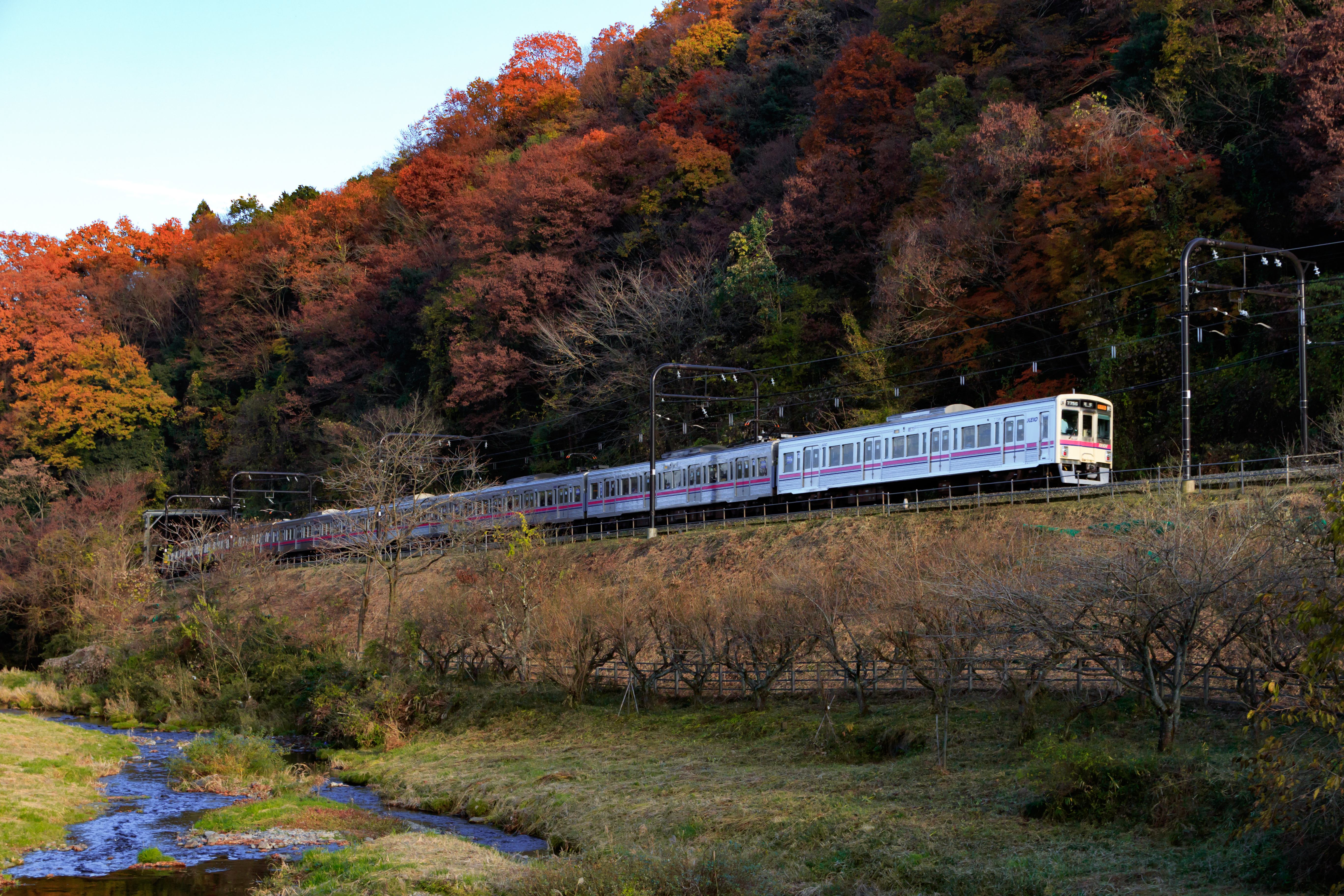 高尾第一トンネルに入る京王高尾線の新宿行き準特急列車。車輌は7000系7706F編成。最後尾はクハ7756。同トンネルは浅川金毘羅神社の下を抜ける。左手前を流れるのは南浅川。八王子市西浅川町の国道20号より撮影。地図はこちら。